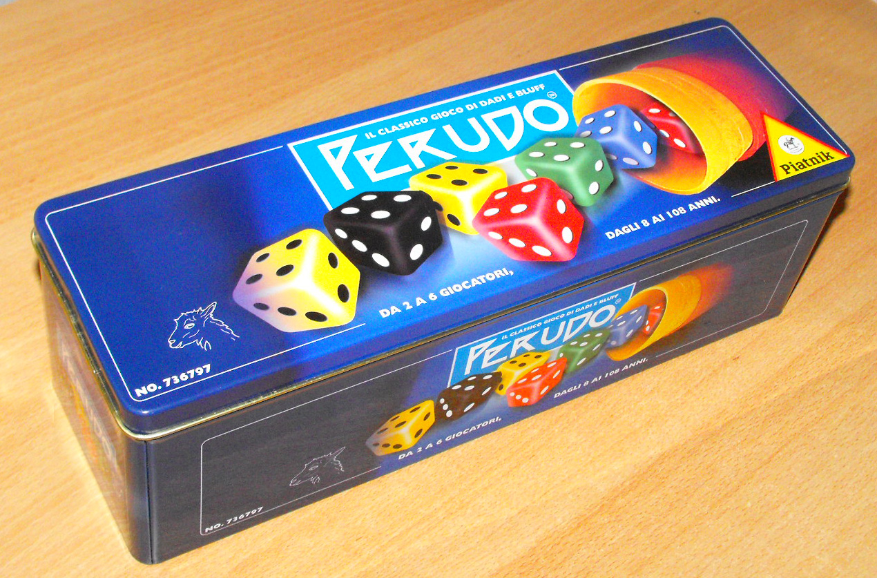 scatola Perudo